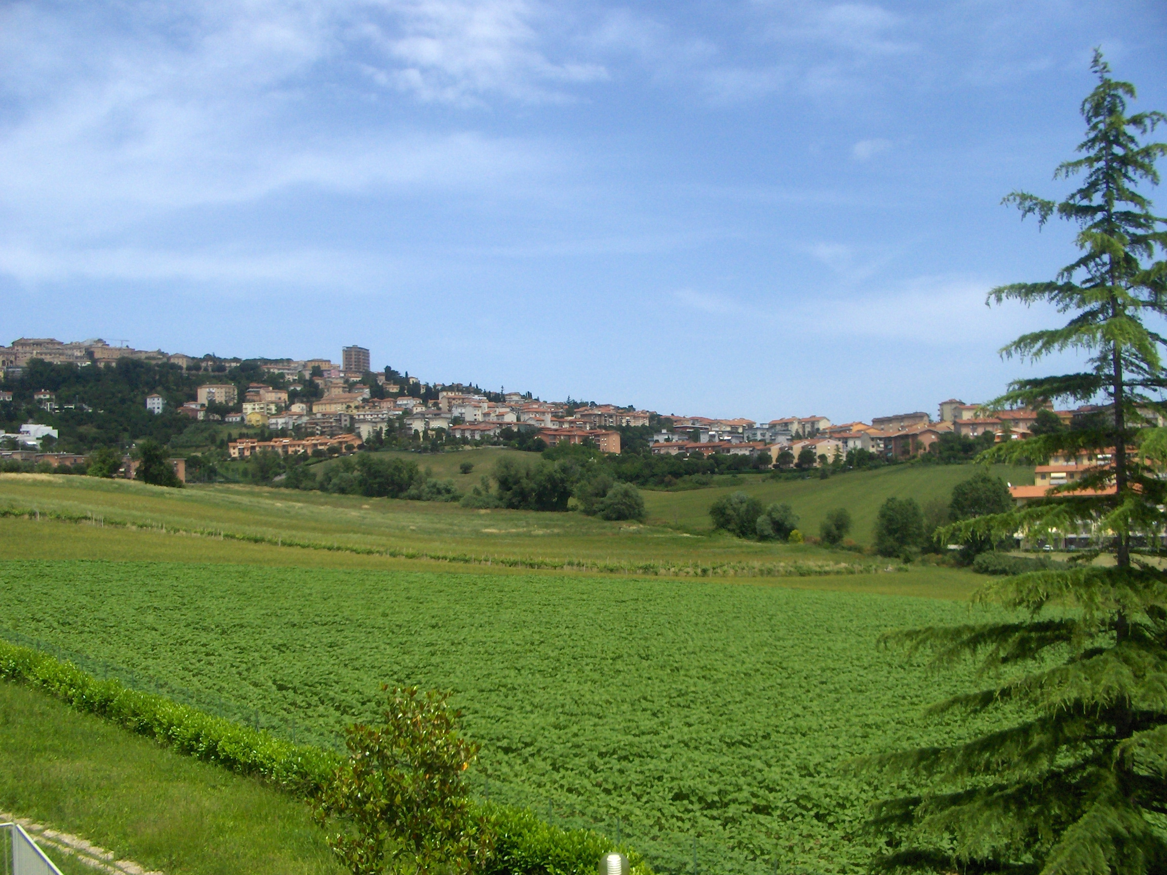 Osimo (provincia di Ancona) vista dalla periferia sud